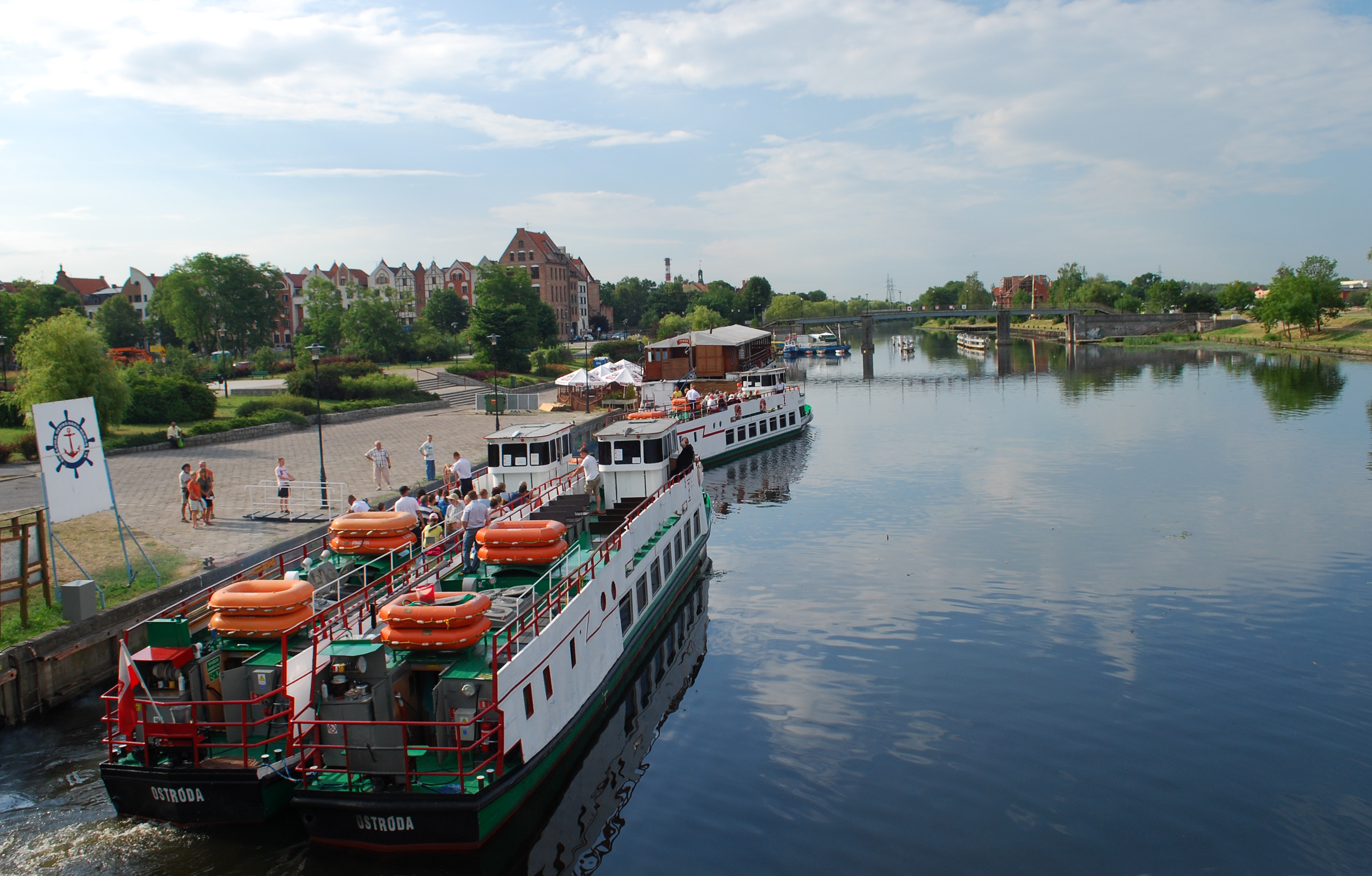 Statki pasażerskie na rzece Elbląg na kei w Elblągu.